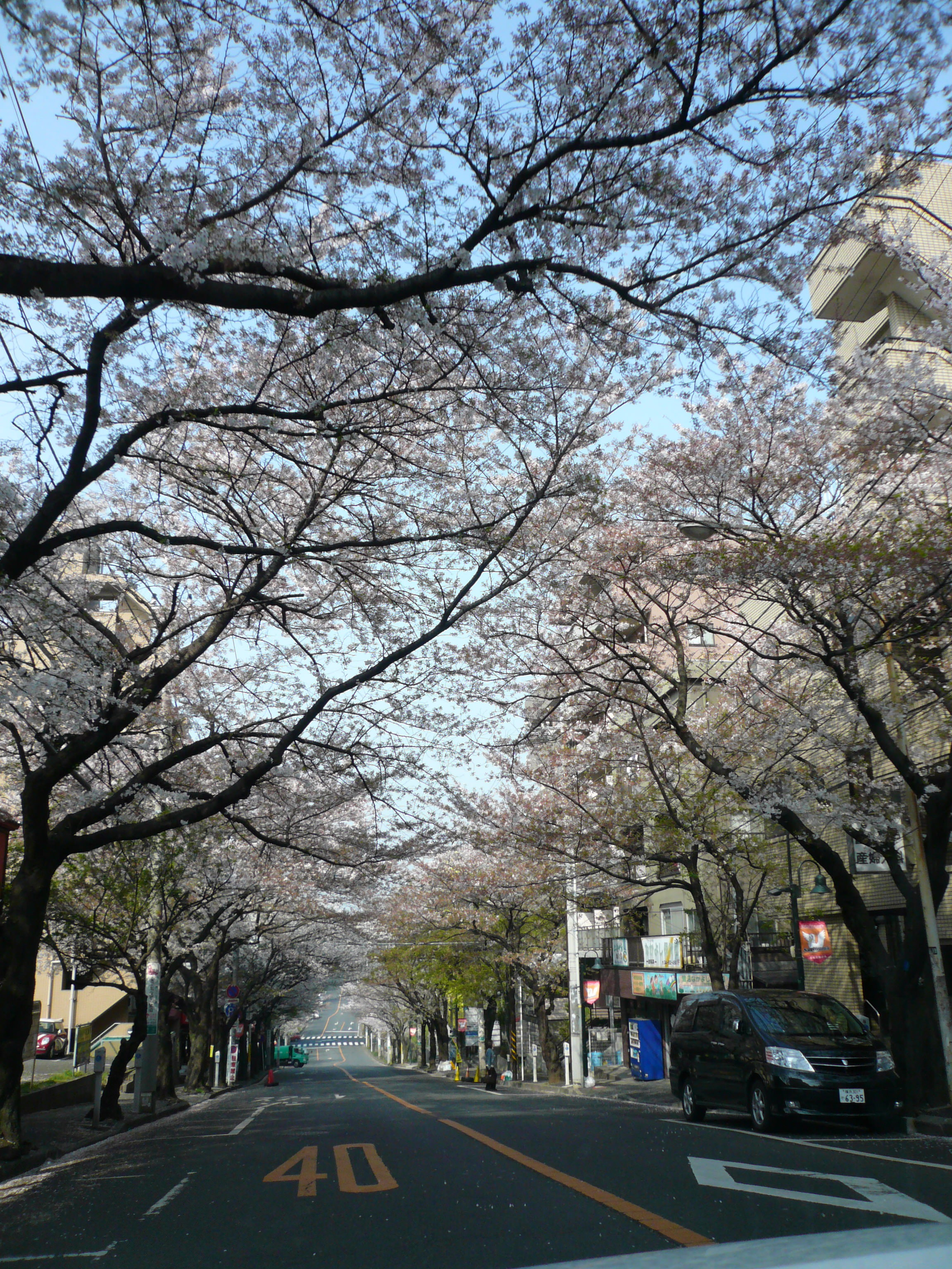 駅前通りには桜並木が続く